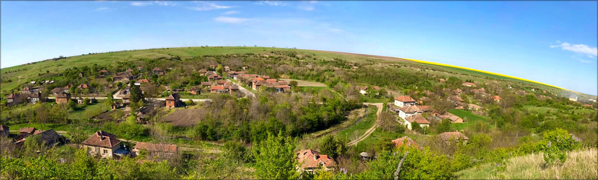 Панормна гледка над село Гостиля